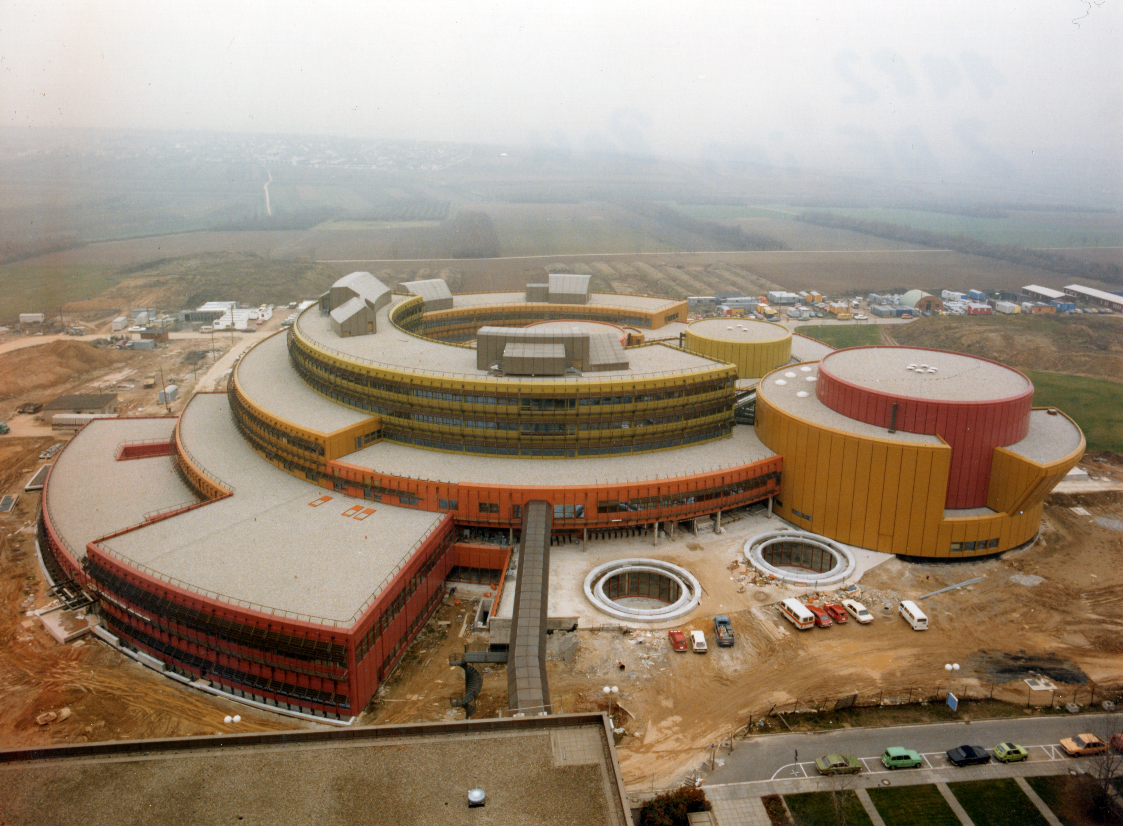 ZDF Studio in der Bauphase 1982